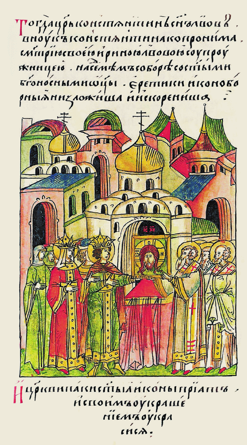 Тогда царь Константин, сын Льва, внук Константина Копро- нима, со своею мате- рью Ириною, супругой царя Льва, на седьмом соборе со святыми богоносными отцами еретиков иконоборцев низложили и искоре- нили, и снова церковь полу- чила святые иконы и украсилась своей красотой